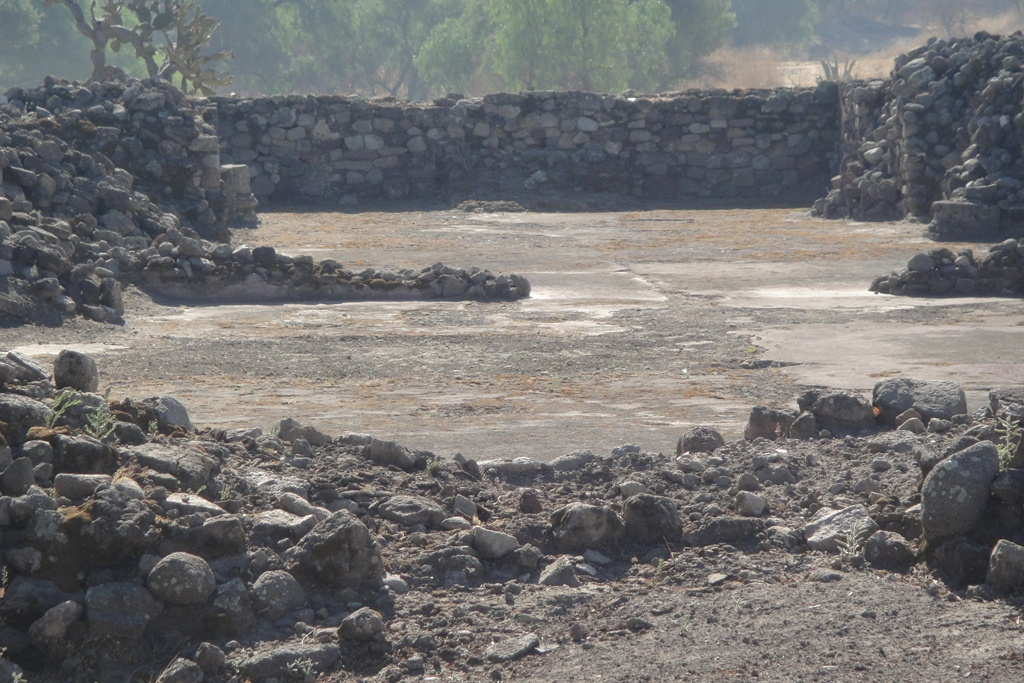 Huexotla, structure 3 internal details